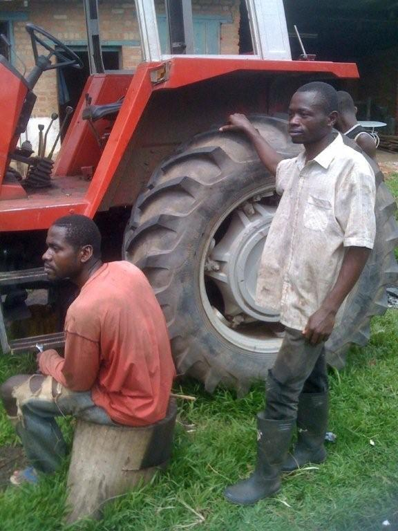 Tracteur Centre de formation agricole à Voka